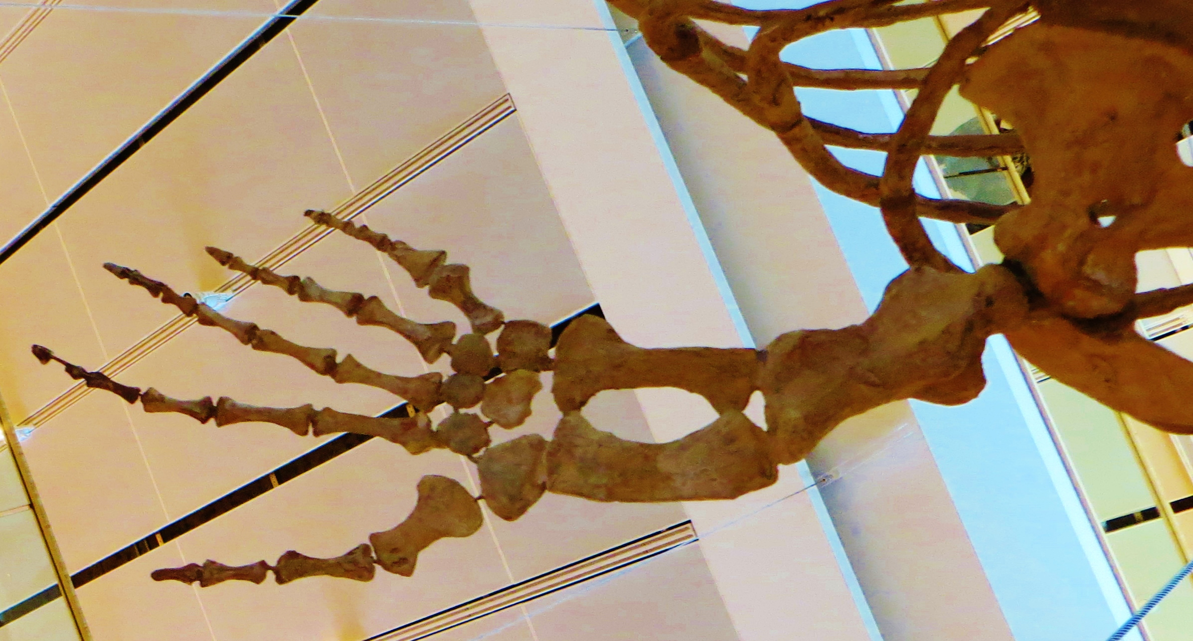 Fossil of Halisaurus, an extinct reptile- Took the picture at Muse (Trento)